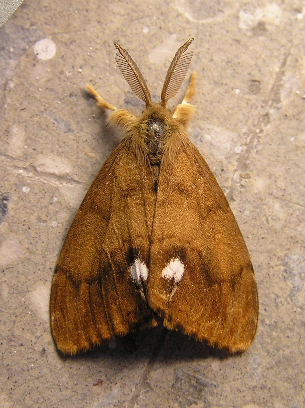 Orgyia antiqua, male, Białowieża, Polska